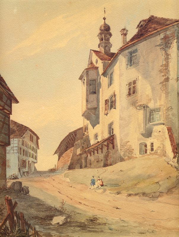 Ansicht der rückwärtigen Seite des Hofs zu Wil von Johann Georg Müller.